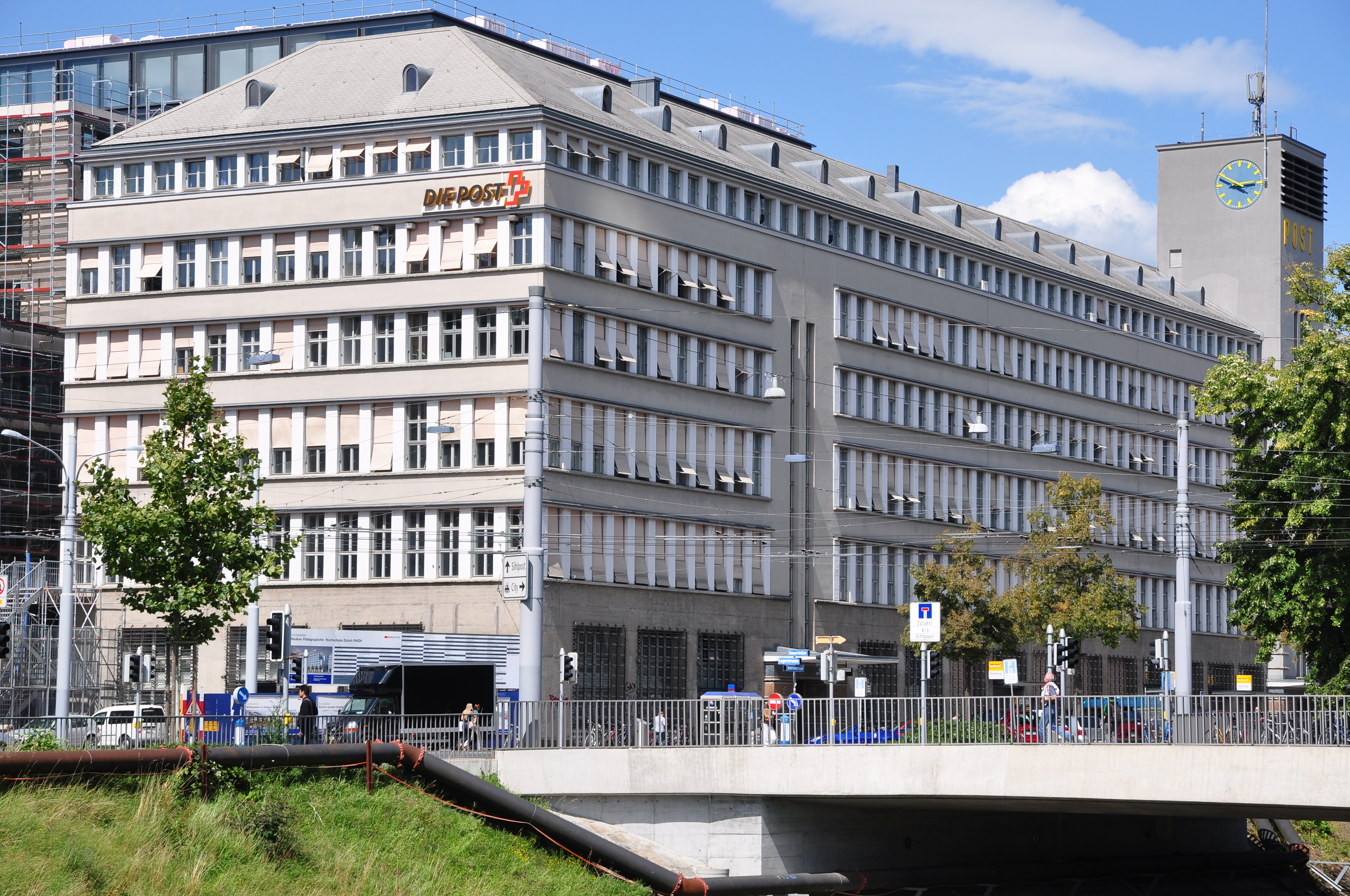 Sihlpost in Zürich (Switzerland)